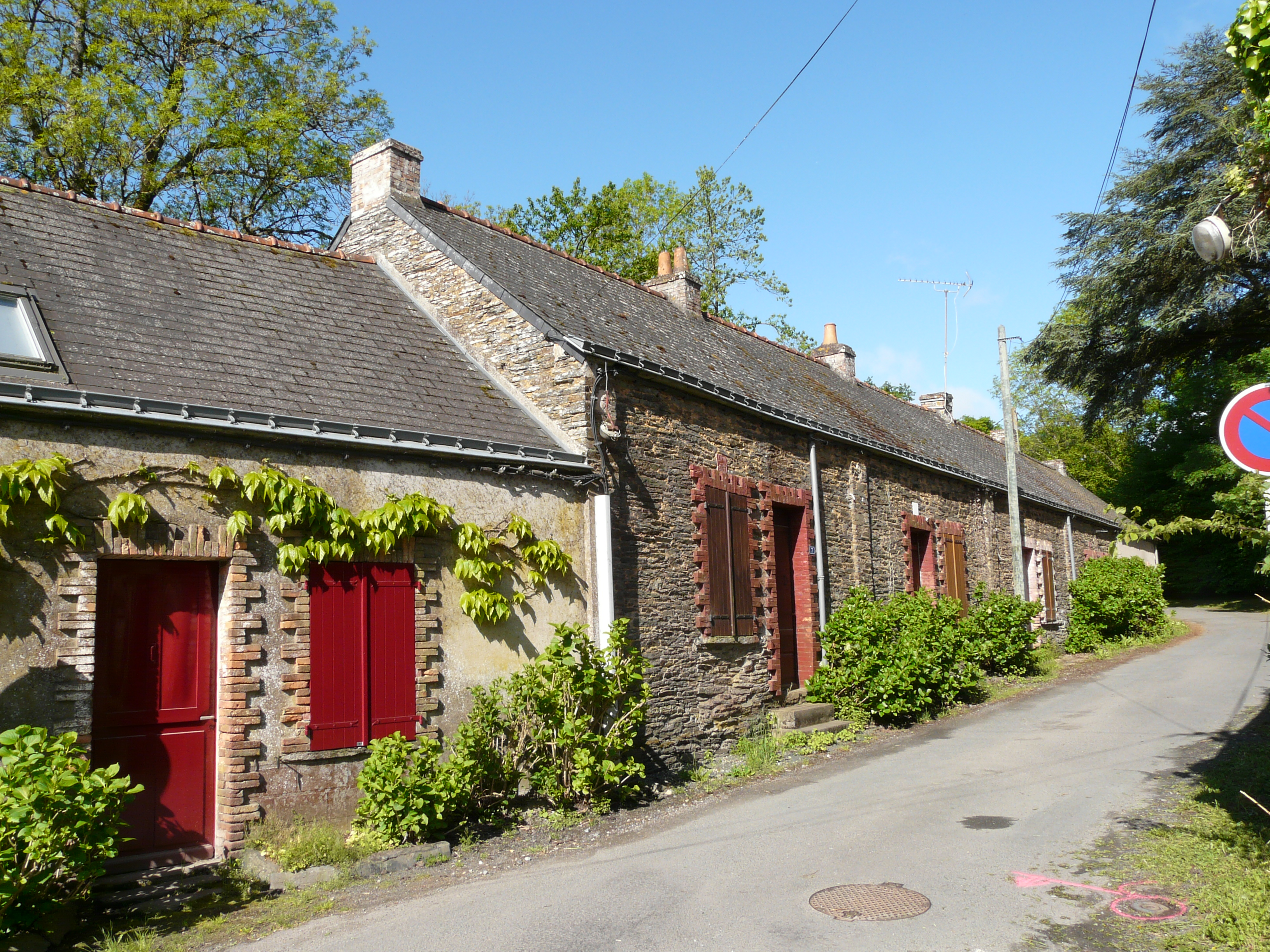 Vue d'ensemble de la rue de logements d'ouvriers de forge.